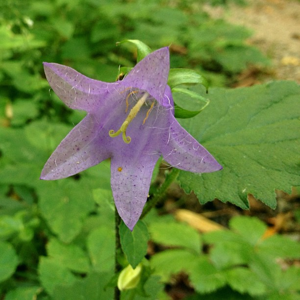 Campanula trachelium (Nesselblättrige Glockenblume) campanulaceae